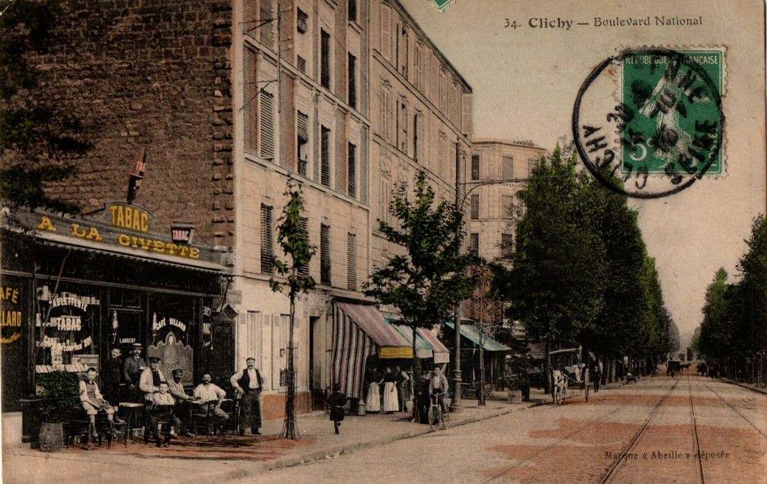 Clichy.Boulevard National.Tabac